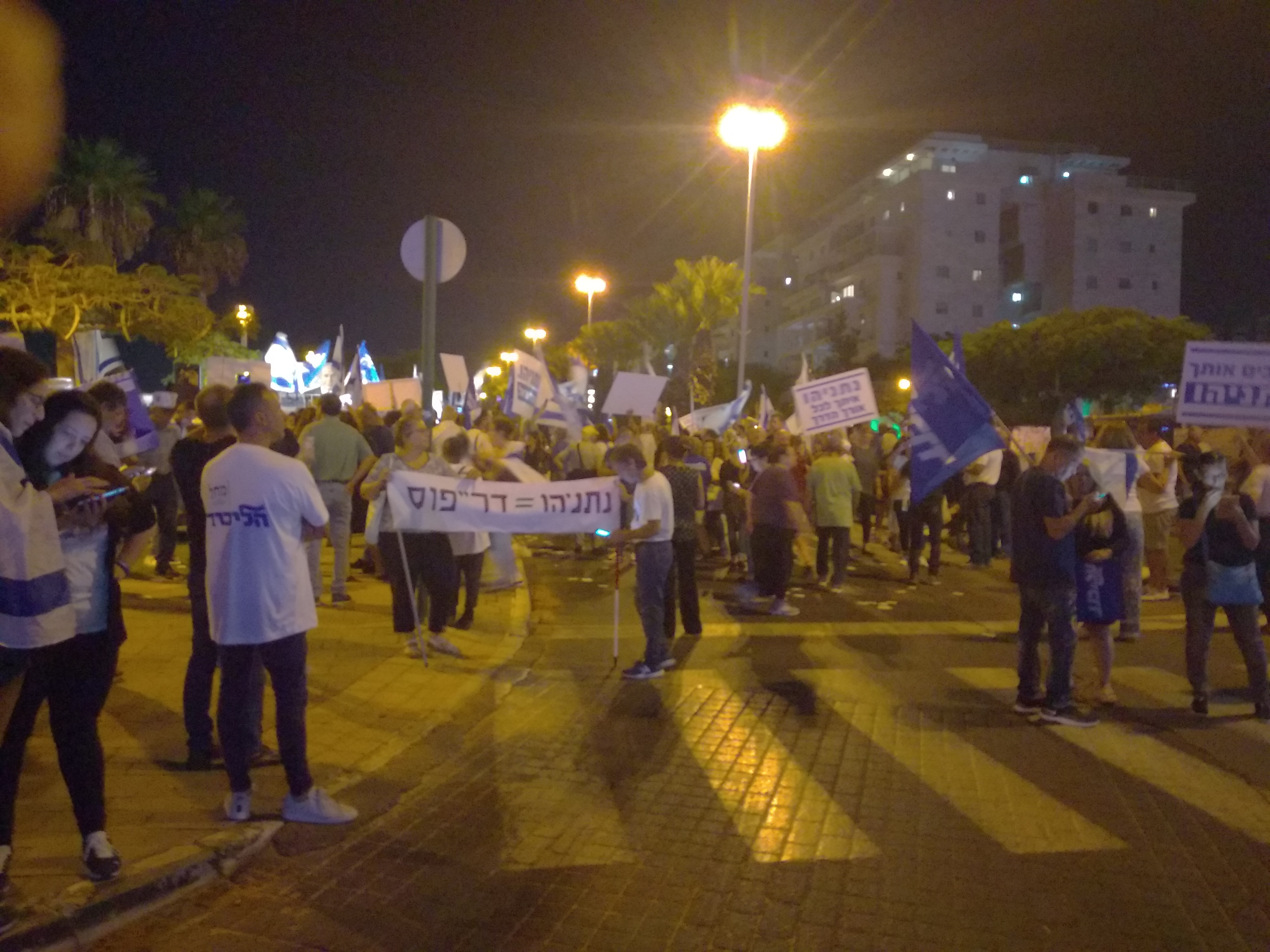 מפגינים בכיכר גורן עם השלט "נתניהו = דרייפוס"